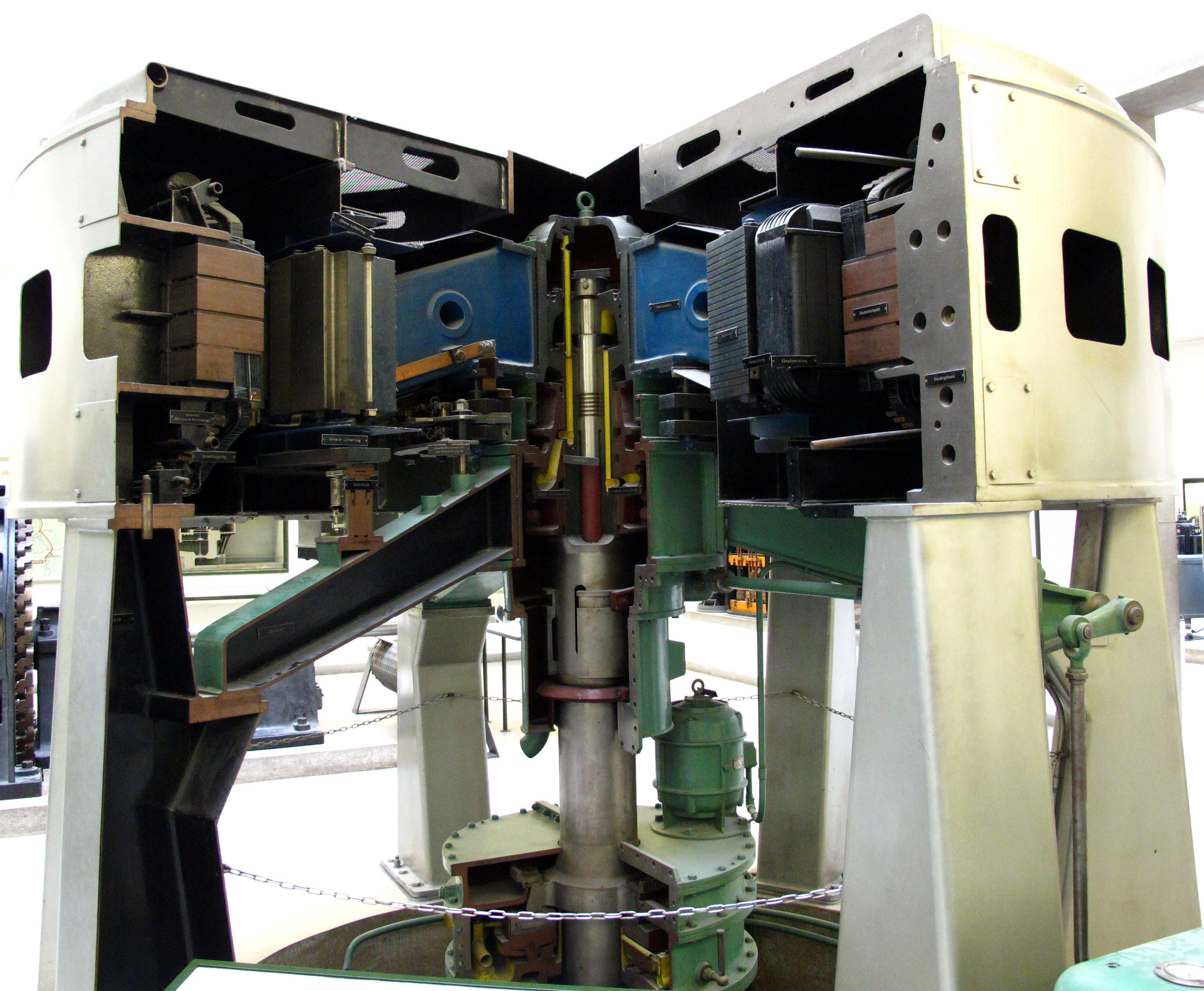 Schirmgenerator für 3000 kVA bei 6300 V, wie sie in Kombination mit Kaplanturbinen in Wasserkraftwerken eingesetzt wurden.